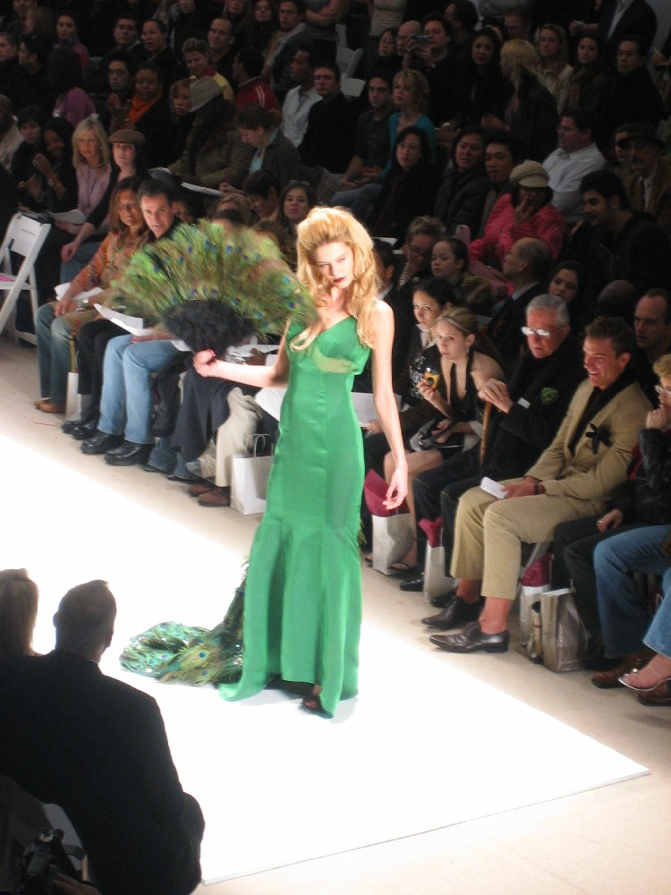 Zang Toi